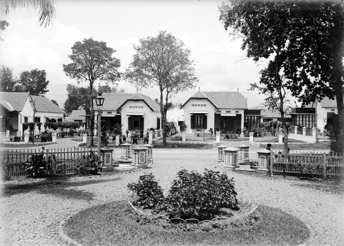 Negatief. Huizen aan de Tjelaket in Malang